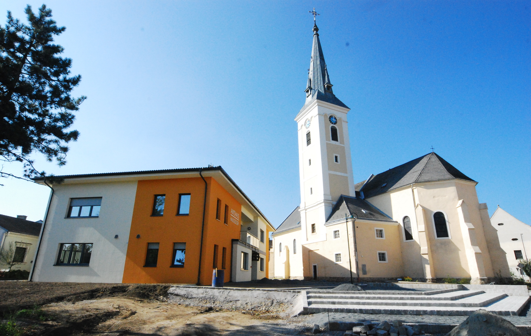 Gemeindeamt und Pfarrkirche von Haugsdorf in Niederösterreich